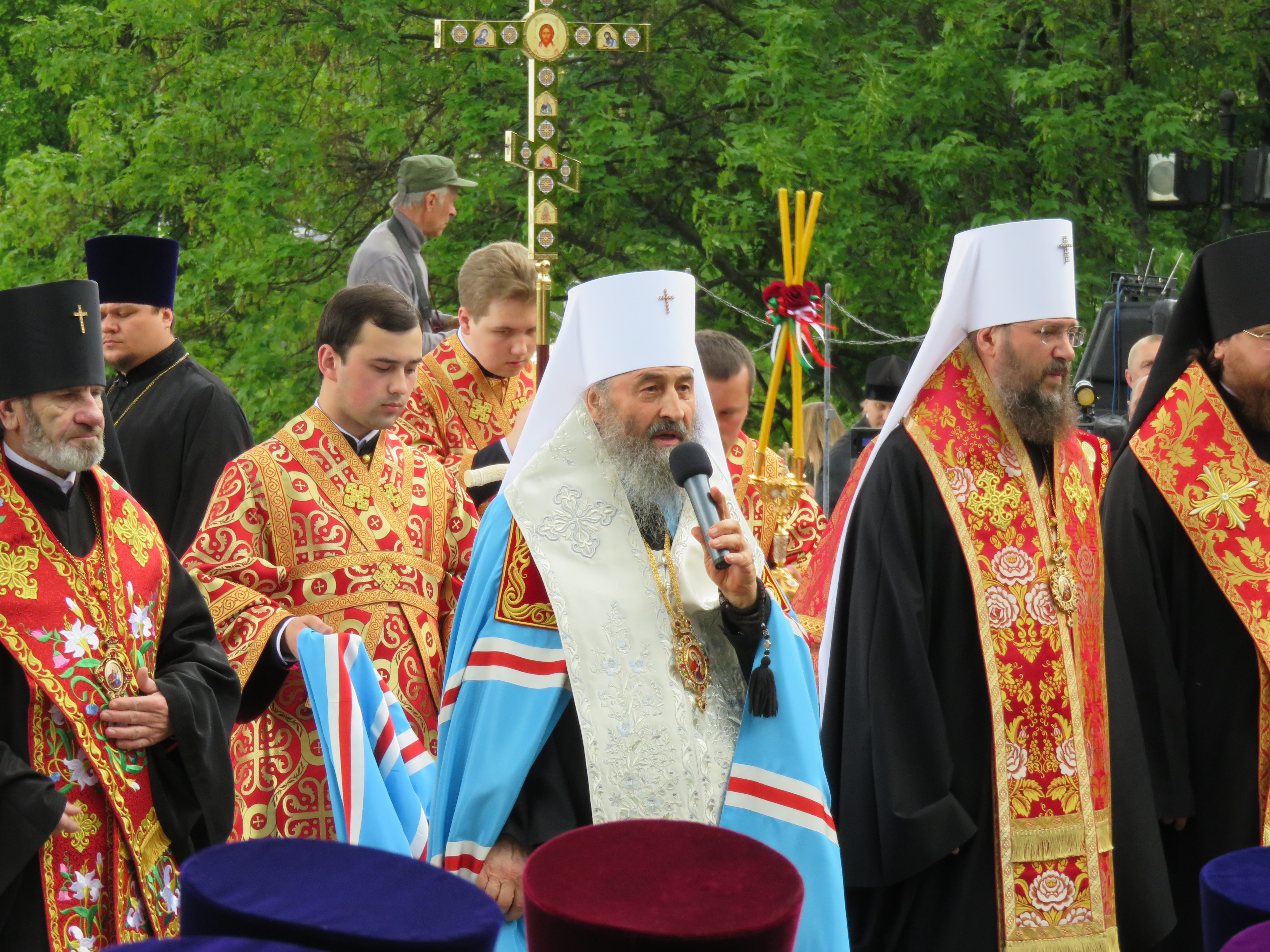 Митрополит Онуфрій (Березовський) під час молебню 8 травня 2016 у Парку Слави